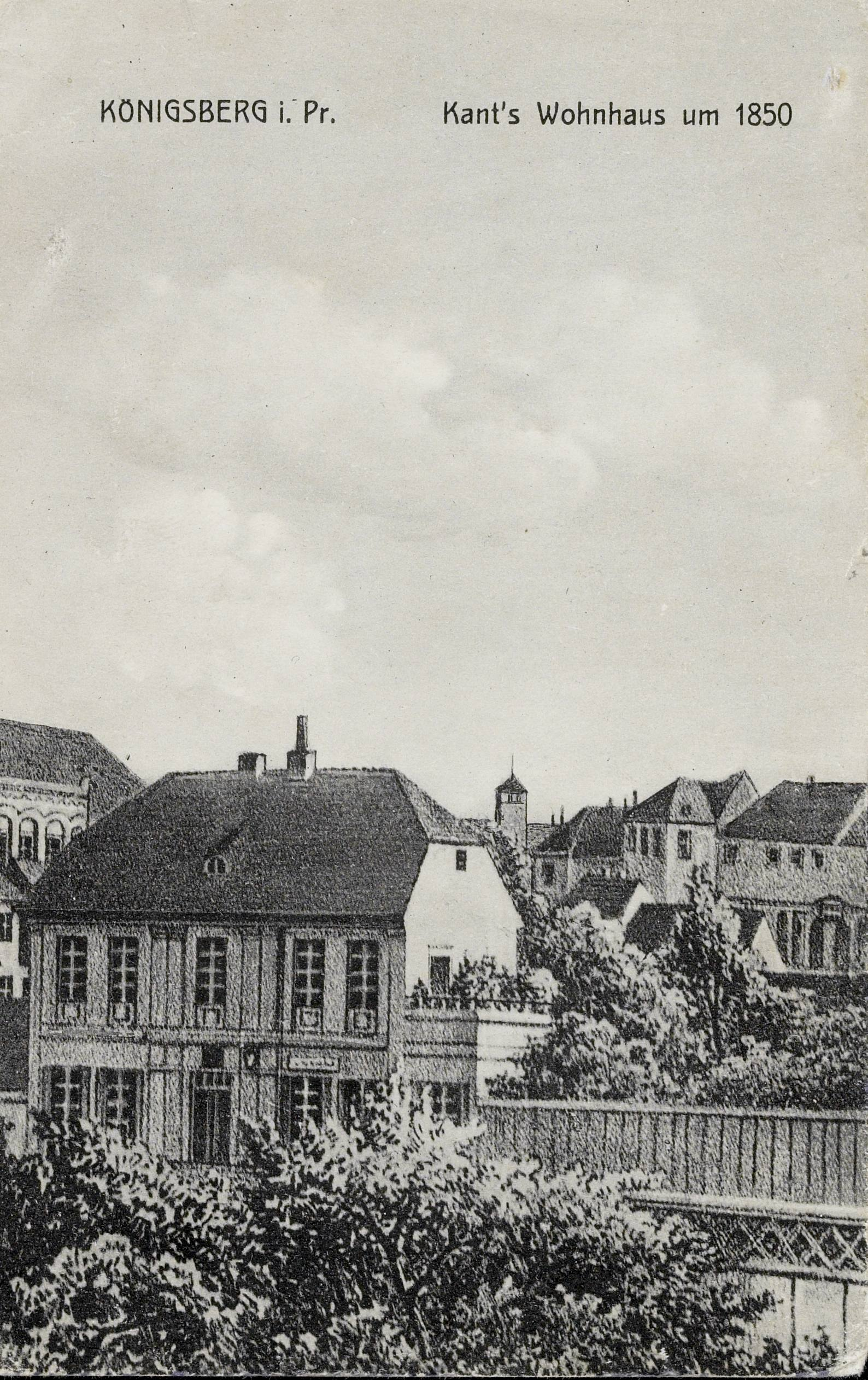 Kants Wohnhaus 1850